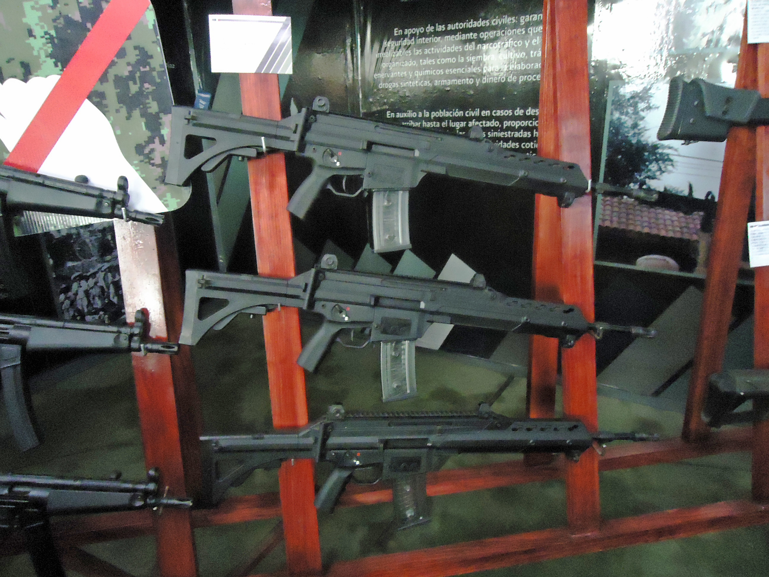 Fusil FX-05 Versión Fusil